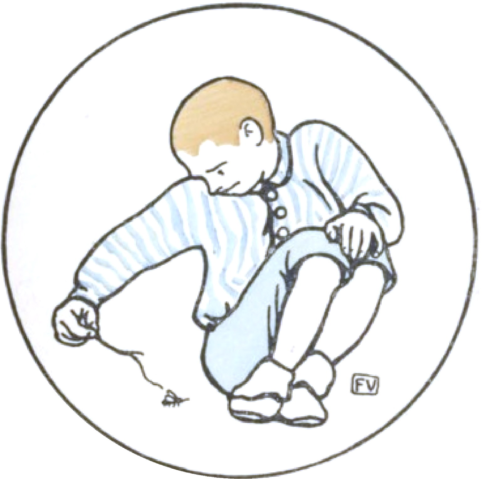 Illustration pour Poil de Carotte (Renard)